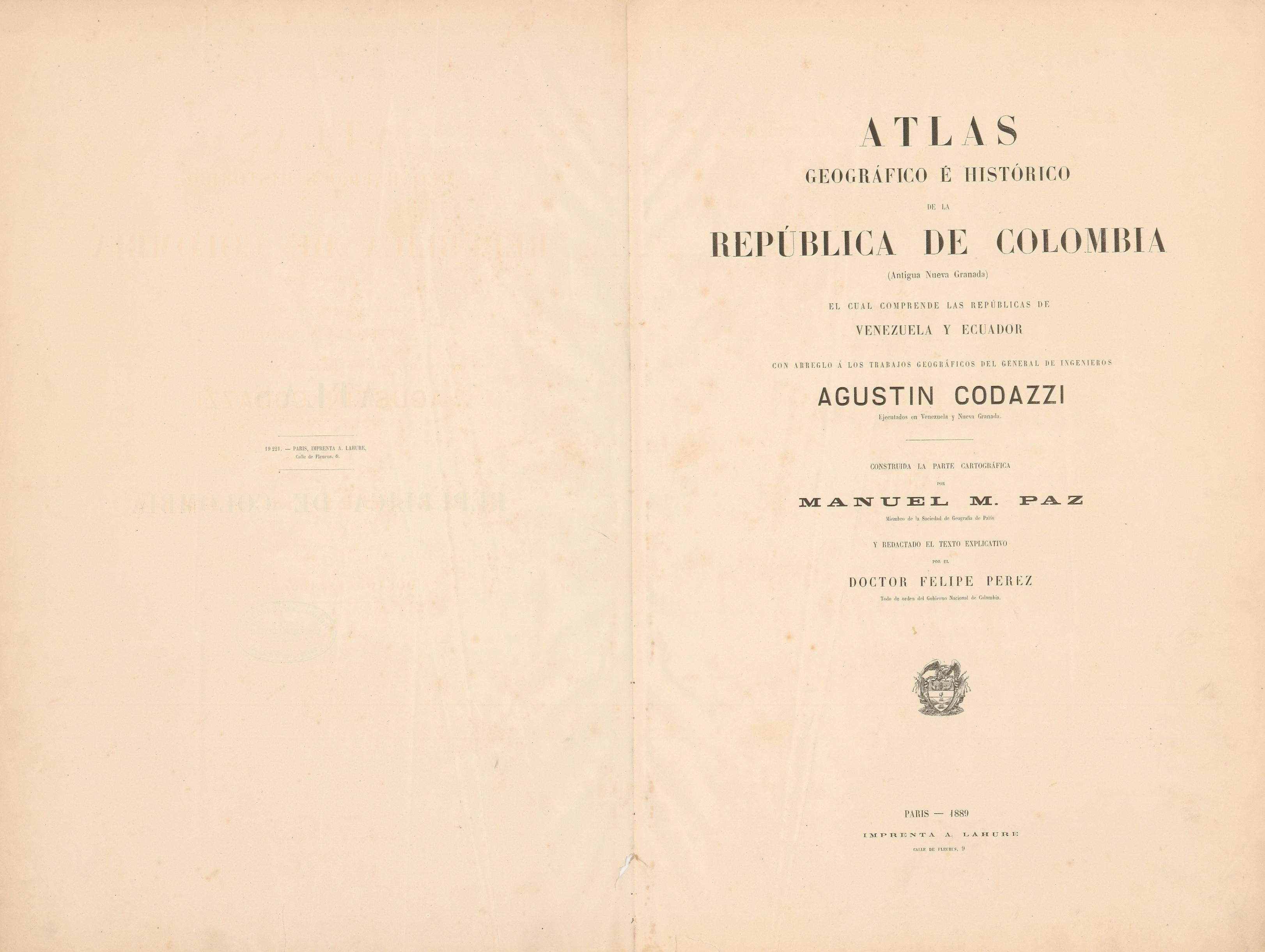 Portada del Atlas geográfico e histórico de la República de Colombia, 1890.